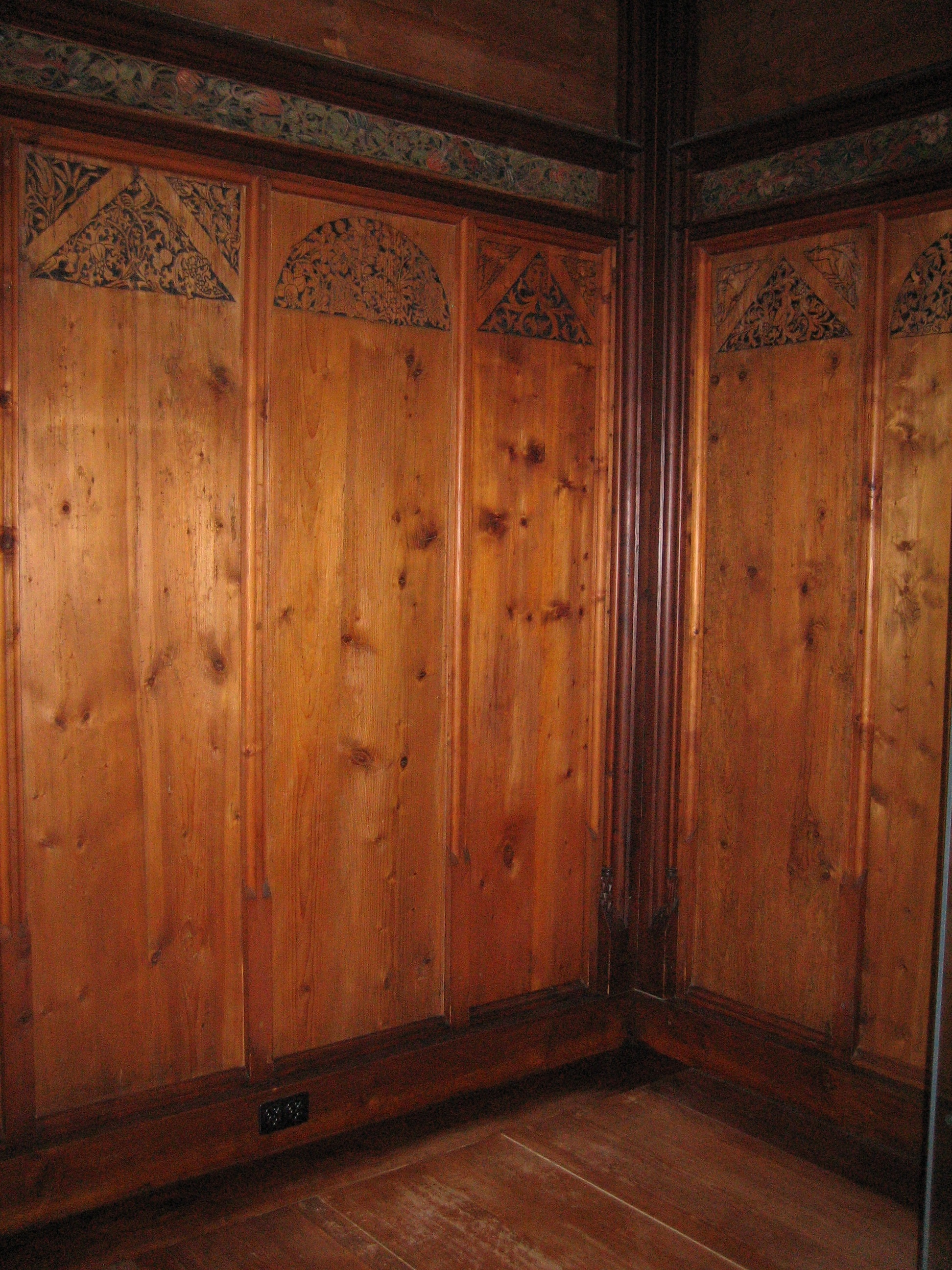 Täfer von 1521 aus dem ehemaligen Kloster Oetenbach in Zürich. Heute im LAndesmuesum, Raum 25